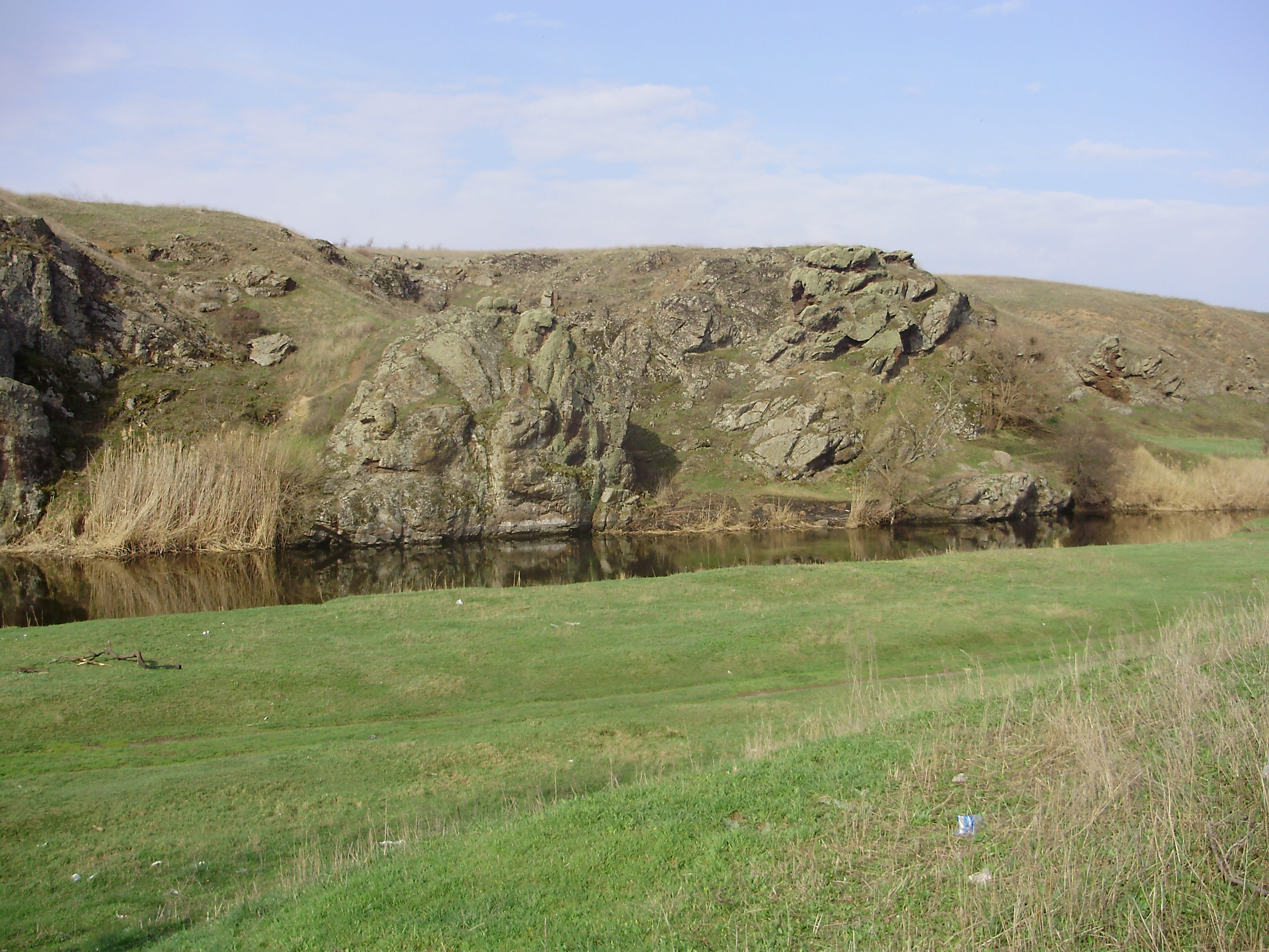 Каньйон у Павлополі